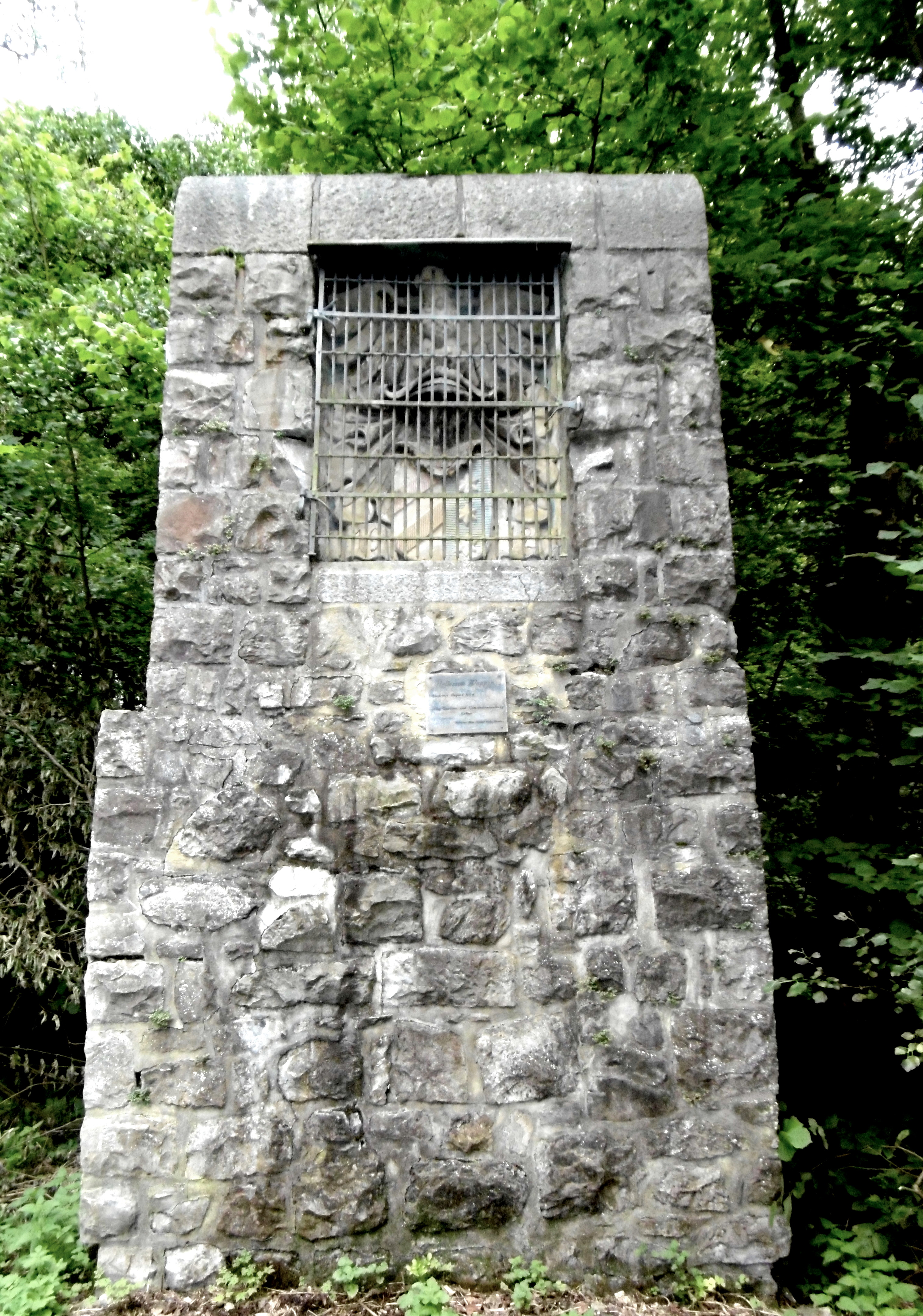 Nellessenwappen an der Außenmauer des Geländes der Eyneburg in Kelmis